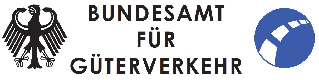 Altes Logo des BAG